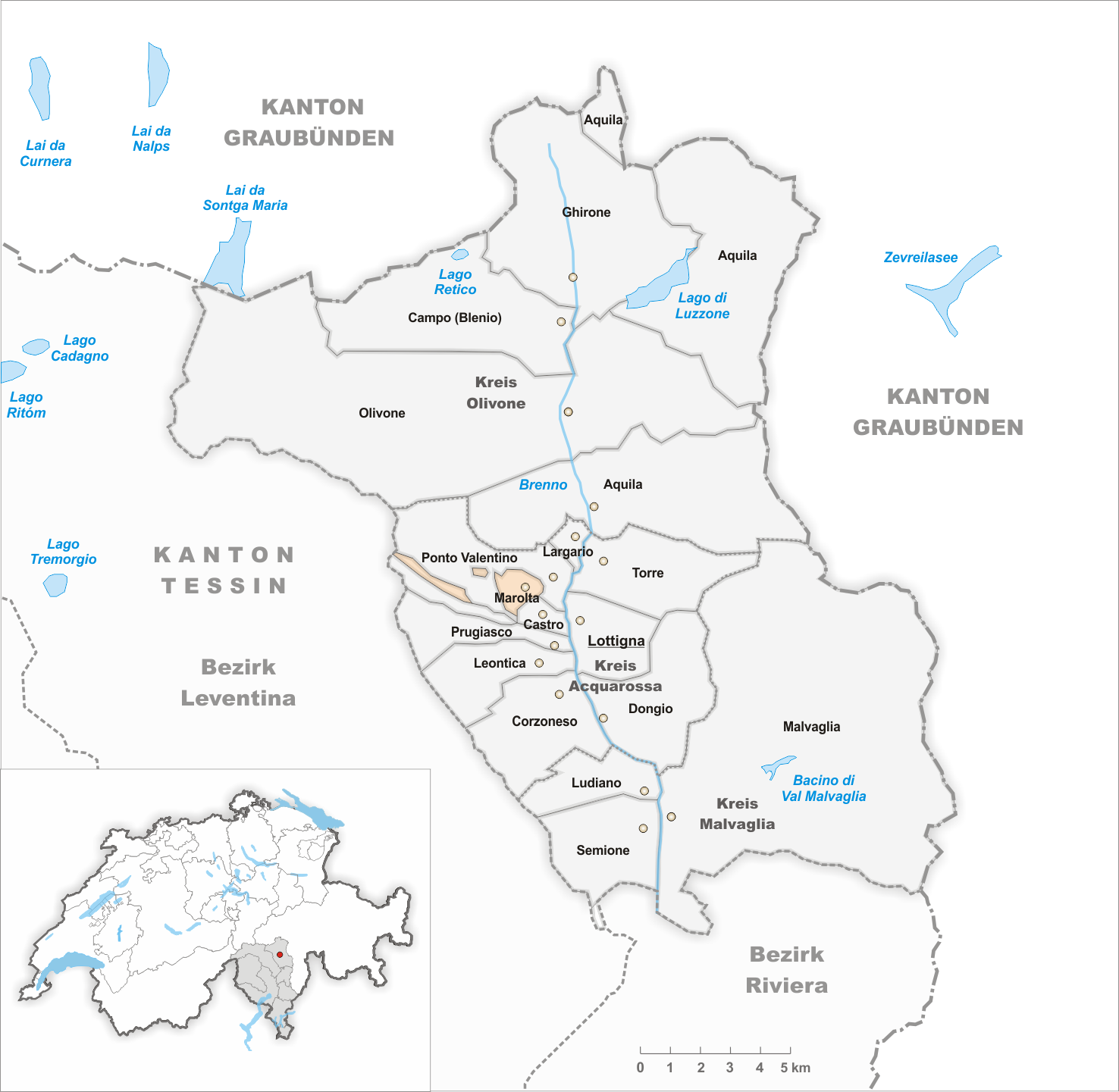 Municipality Marolta